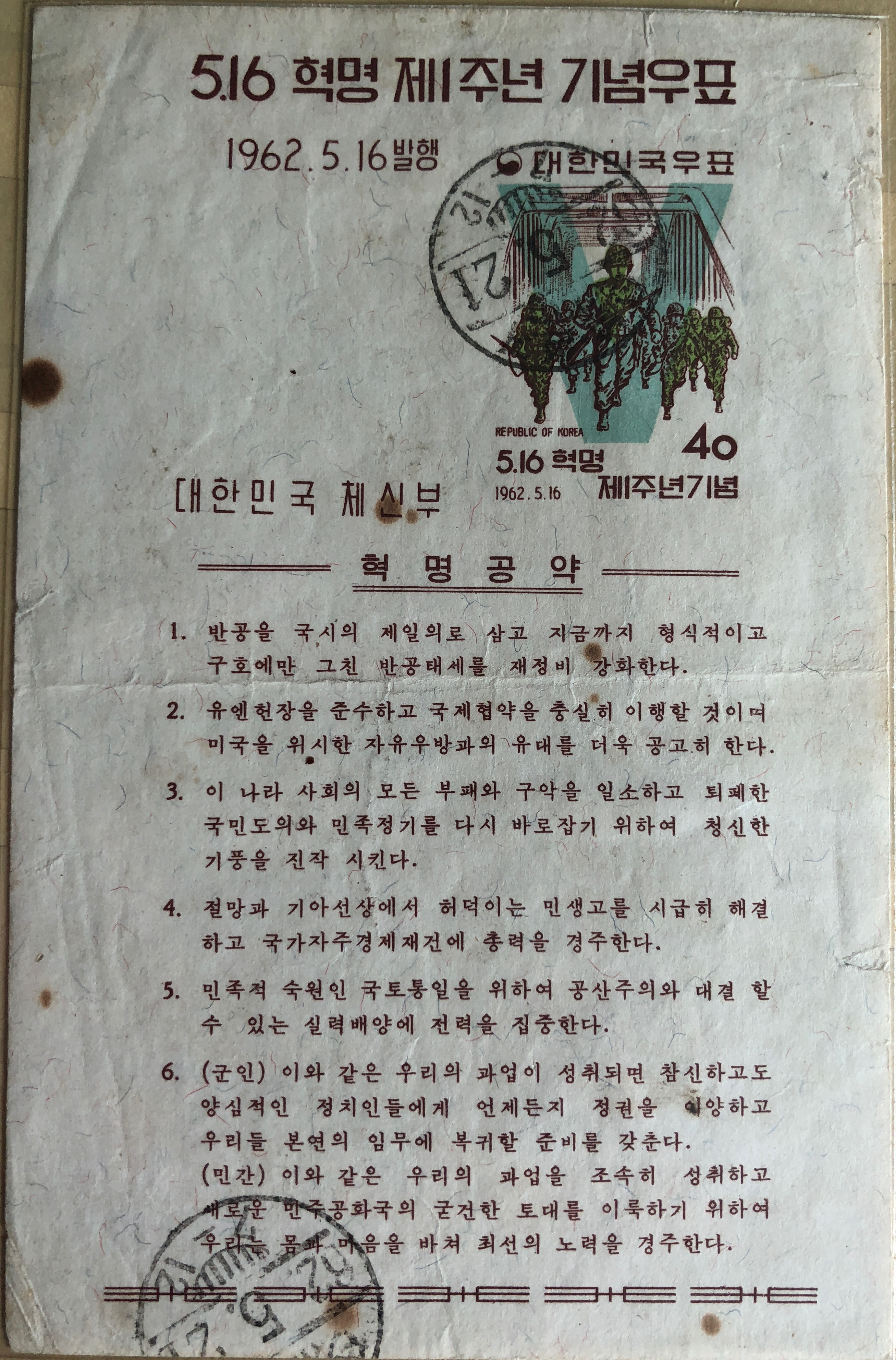 516 혁명 제 1주년 기념우표